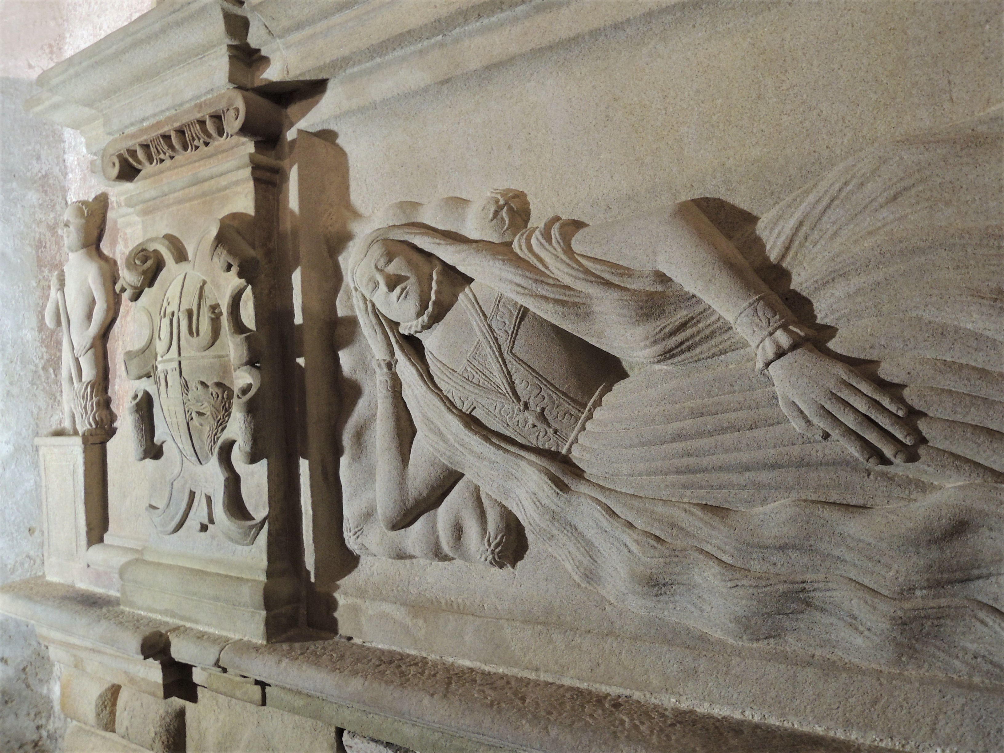 Renesansowy nagrobek symboliczny Stanisława i Jadwigi Myszkowskich znajdujący się w prezbiterium kościoła pw. Wniebowzięcia Najświętszej Maryi Panny w Bestwinie w trakcie prac konserwatorskich (2016 rok).